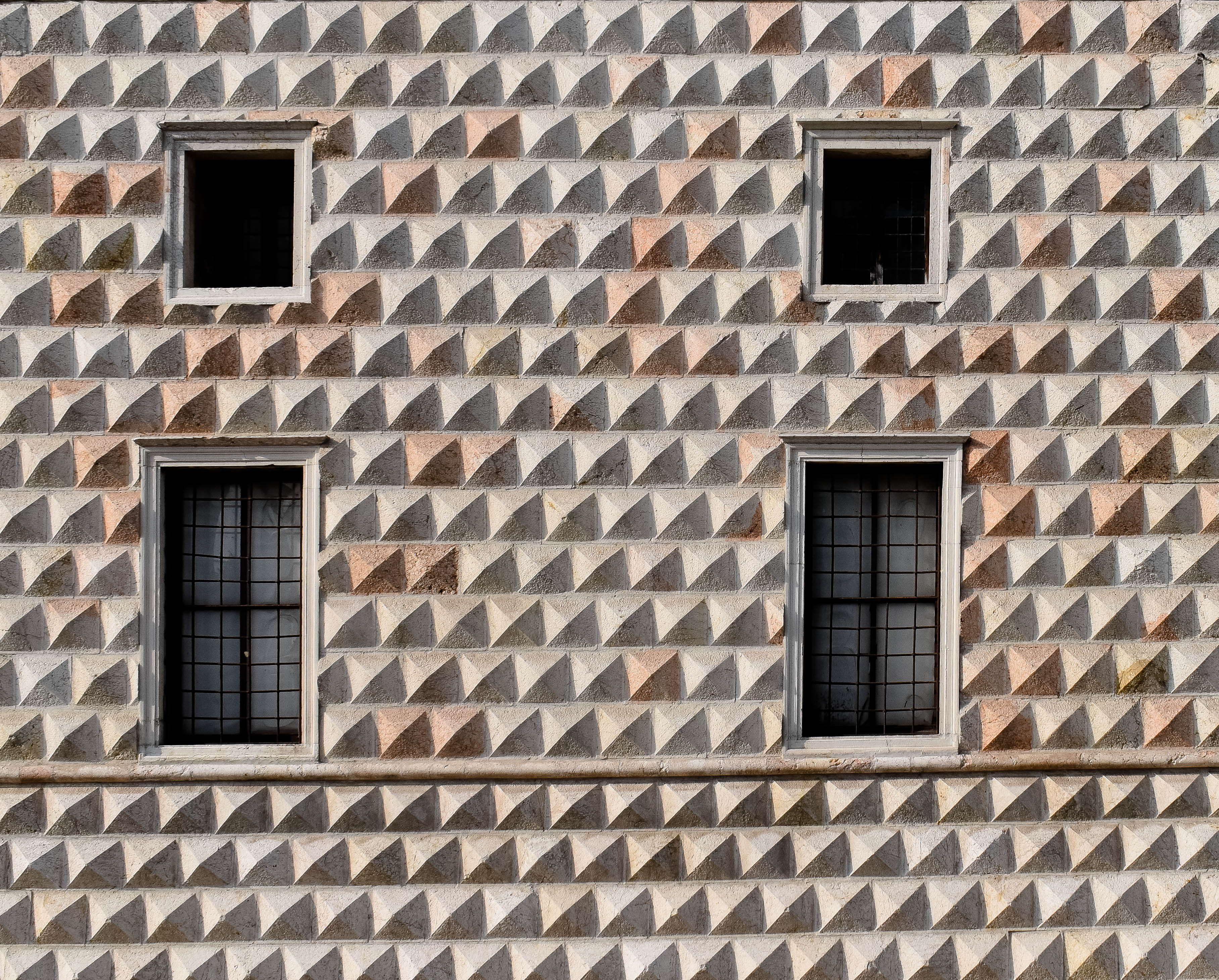 Finestre su corso Biagio Rossetti, palazzo dei Diamanti, Ferrara This is a photo of a monument which is part of cultural heritage of Italy.